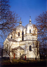 Церква у с. Перегноїв (Глинянський деканат). 1907 р., архітектор В. Нагірний (1848—1921)